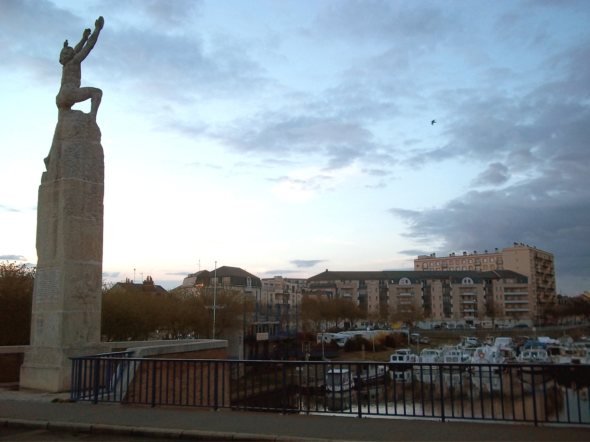 Vue du port et statue en hommage à Wilbur Wright - Le Mans - France